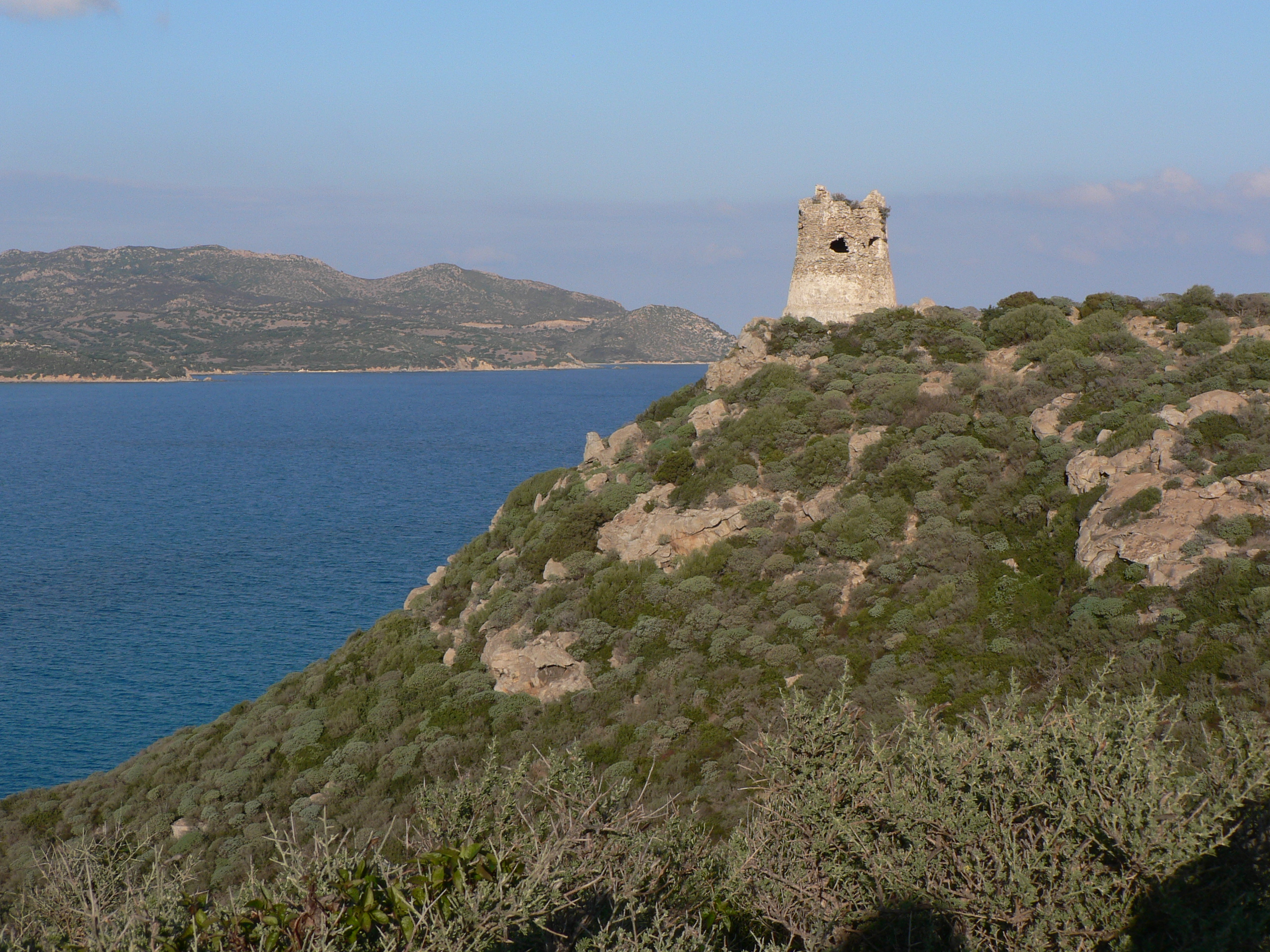 Capo Carbonara (Villasimius) - Torre Porto GiuncoA tower, Capo Carbonara